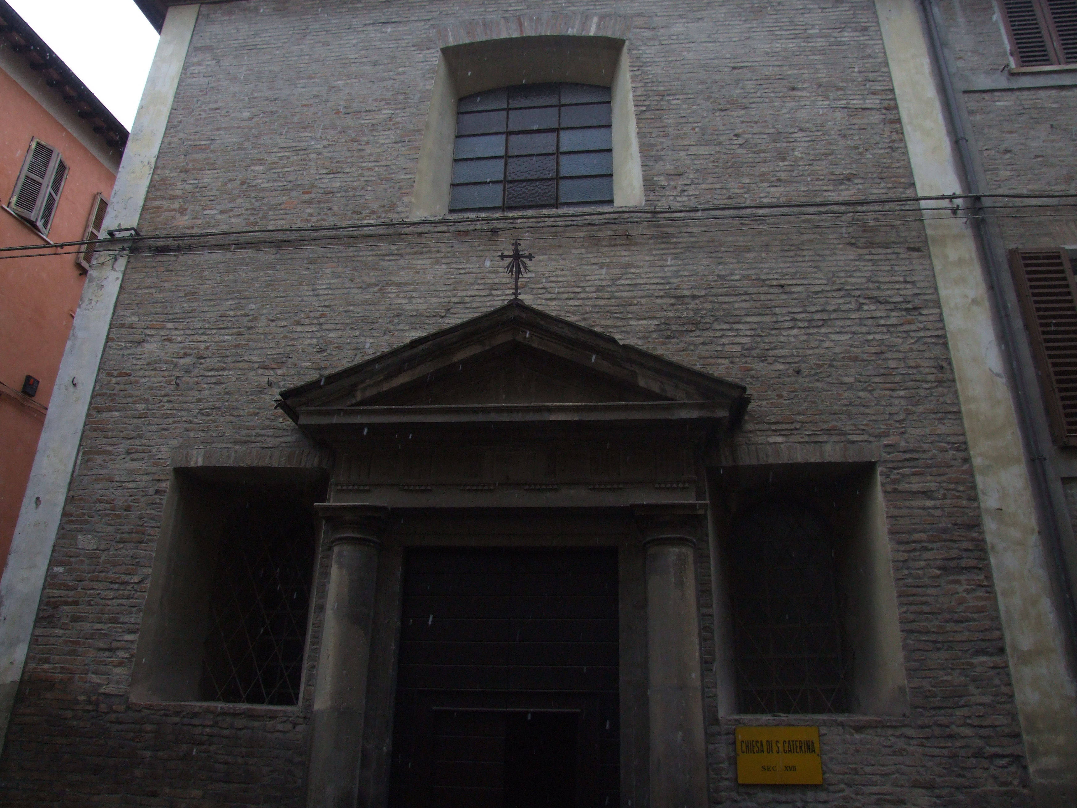 Chiesa di Santa Caterina This is a photo of a monument which is part of cultural heritage of Italy.